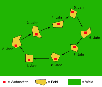 Beispielhafte Zyklen einer typischen Wanderfeldwirtschaft in den Tropen